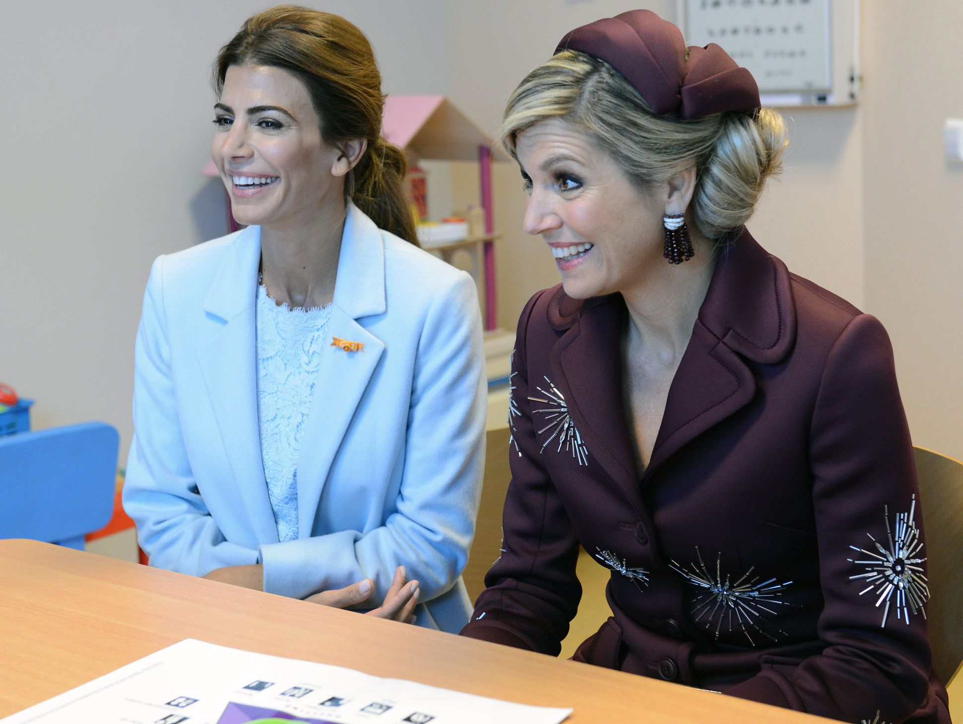 La Primera Dama de la Nación, Juliana Awada en su encuentro con la Reina Máxima de los Países Bajos en Amsterdam.